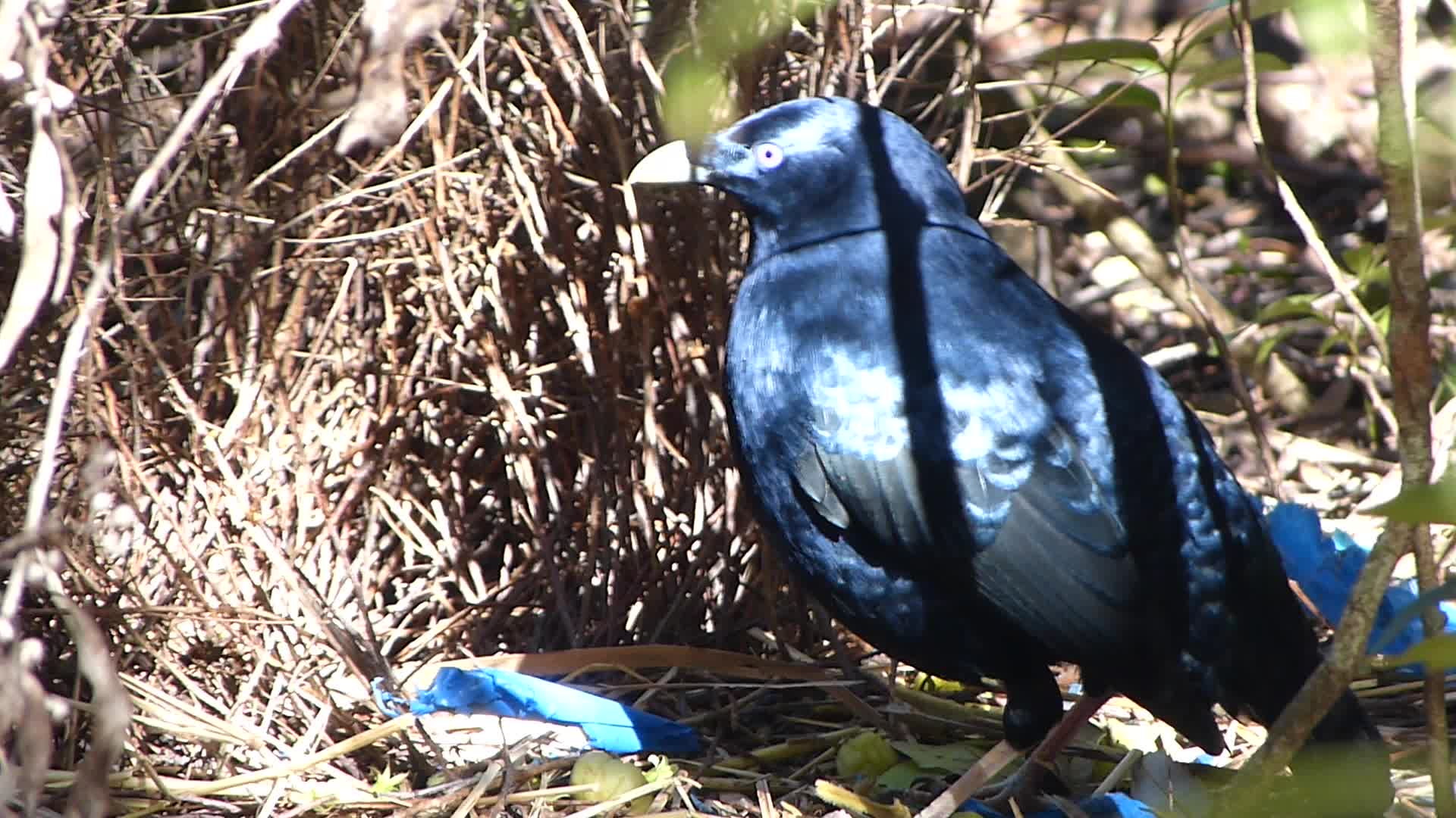 Springbrook. Lamington National Park. QLD